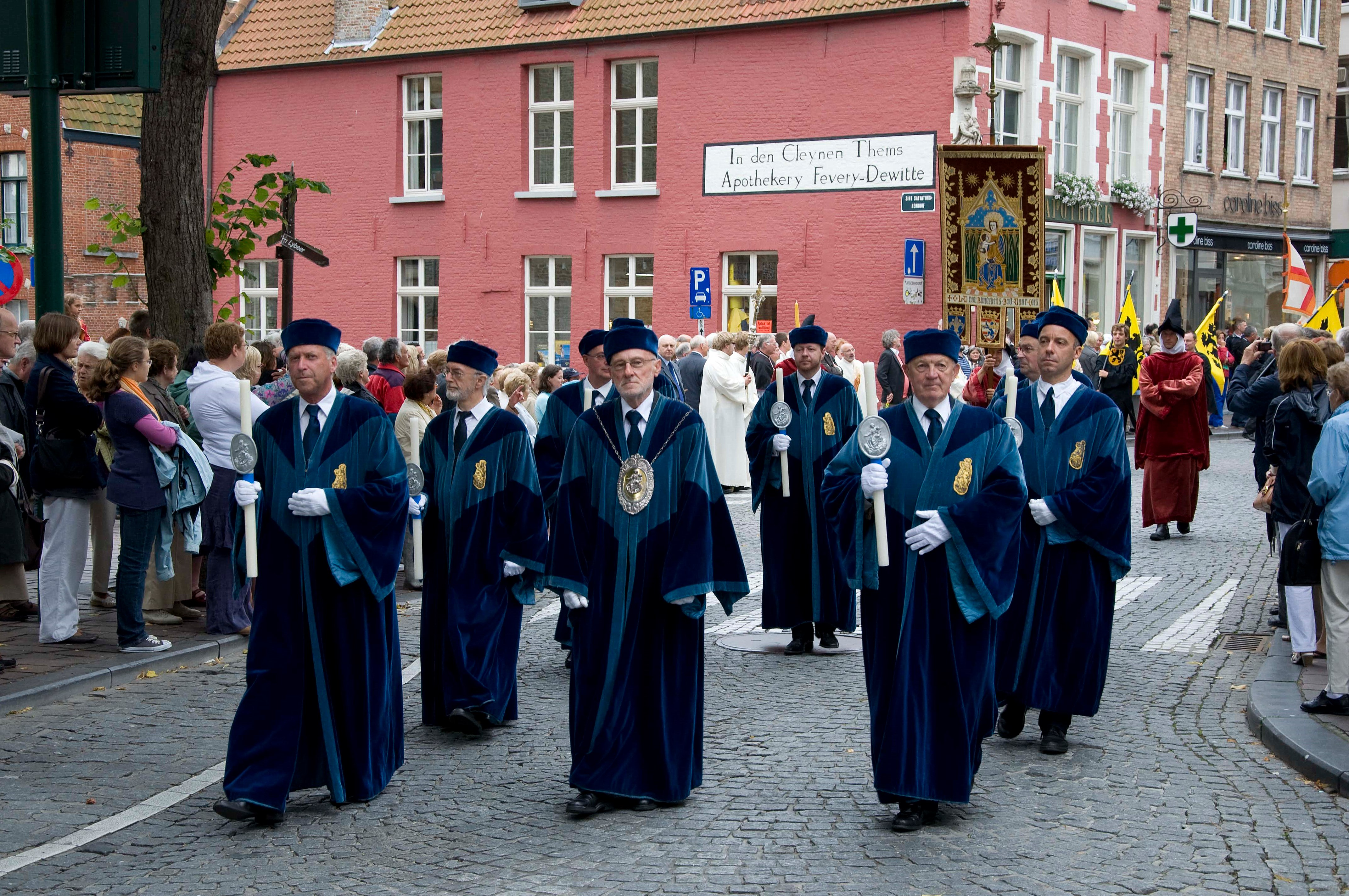 De confrérie Onze-Lieve-Vrouw van Blindekens van Brugge, België